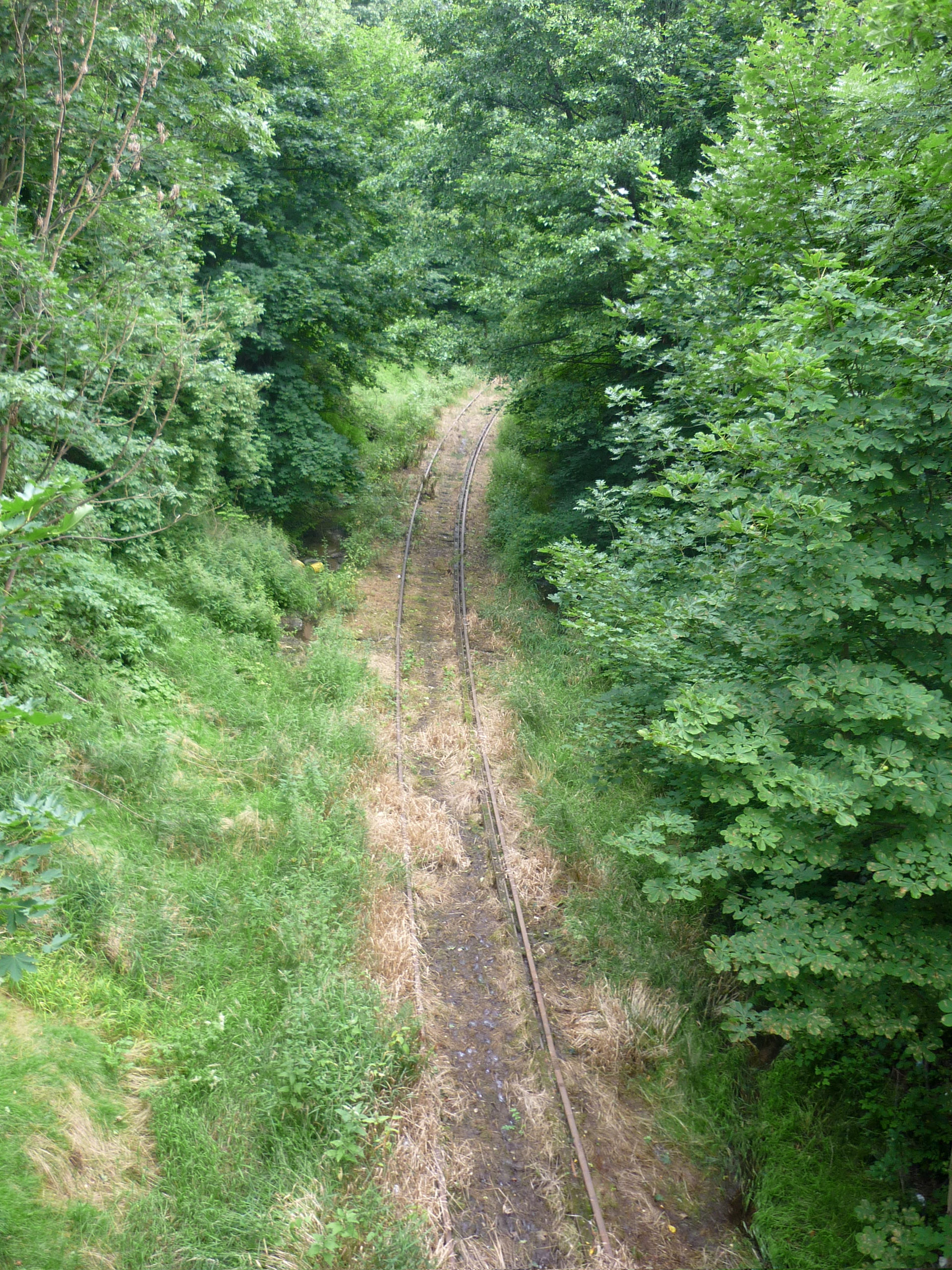 Stillgelegte Bahnstrecke (Einschnitt) oberhalb vom Bahnhof Schmiedeberg (Kowary) in Niederschlesien